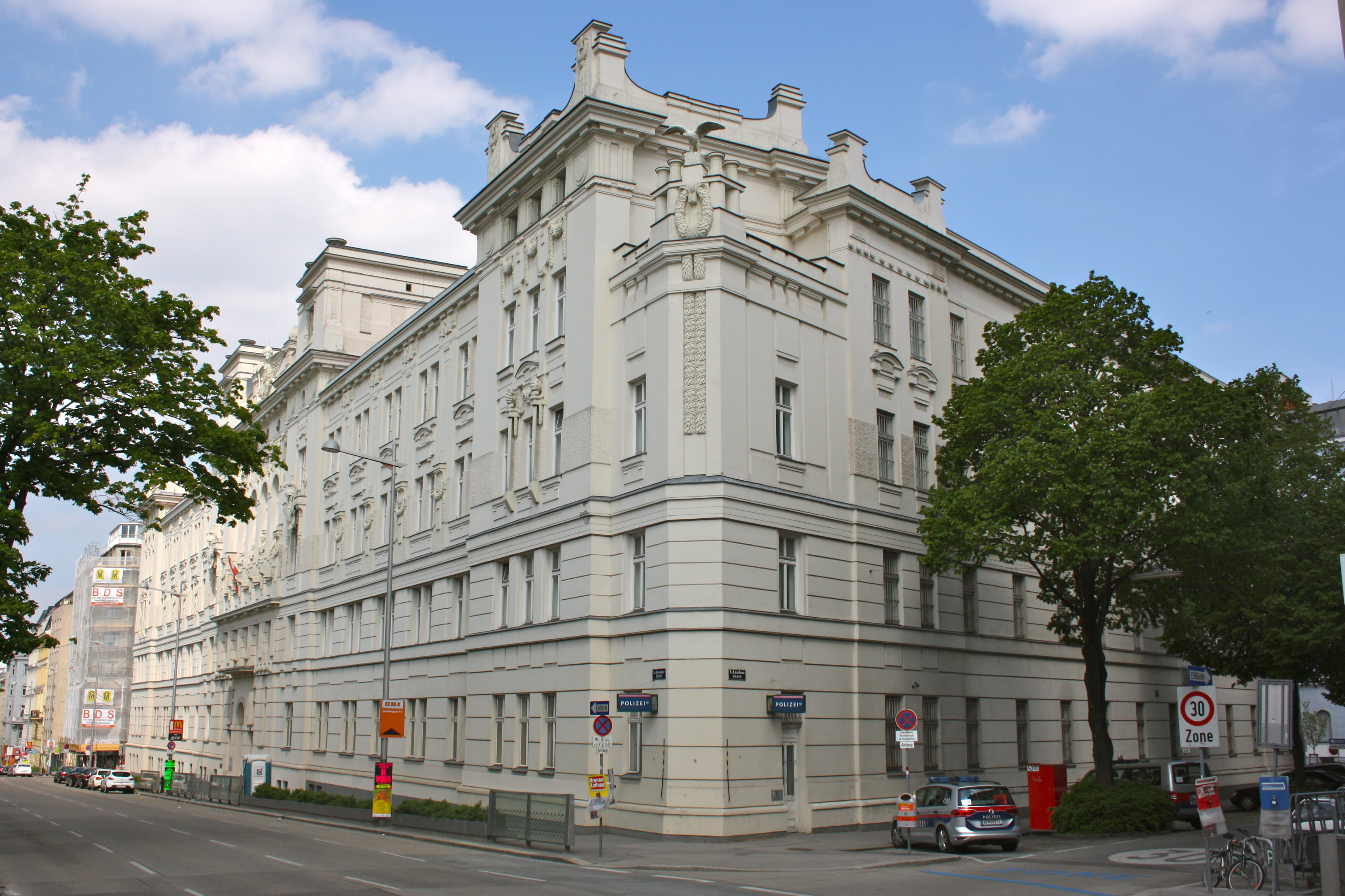 Polizeigebäude Hernalser Gürtel, Wien-Josefstadt.